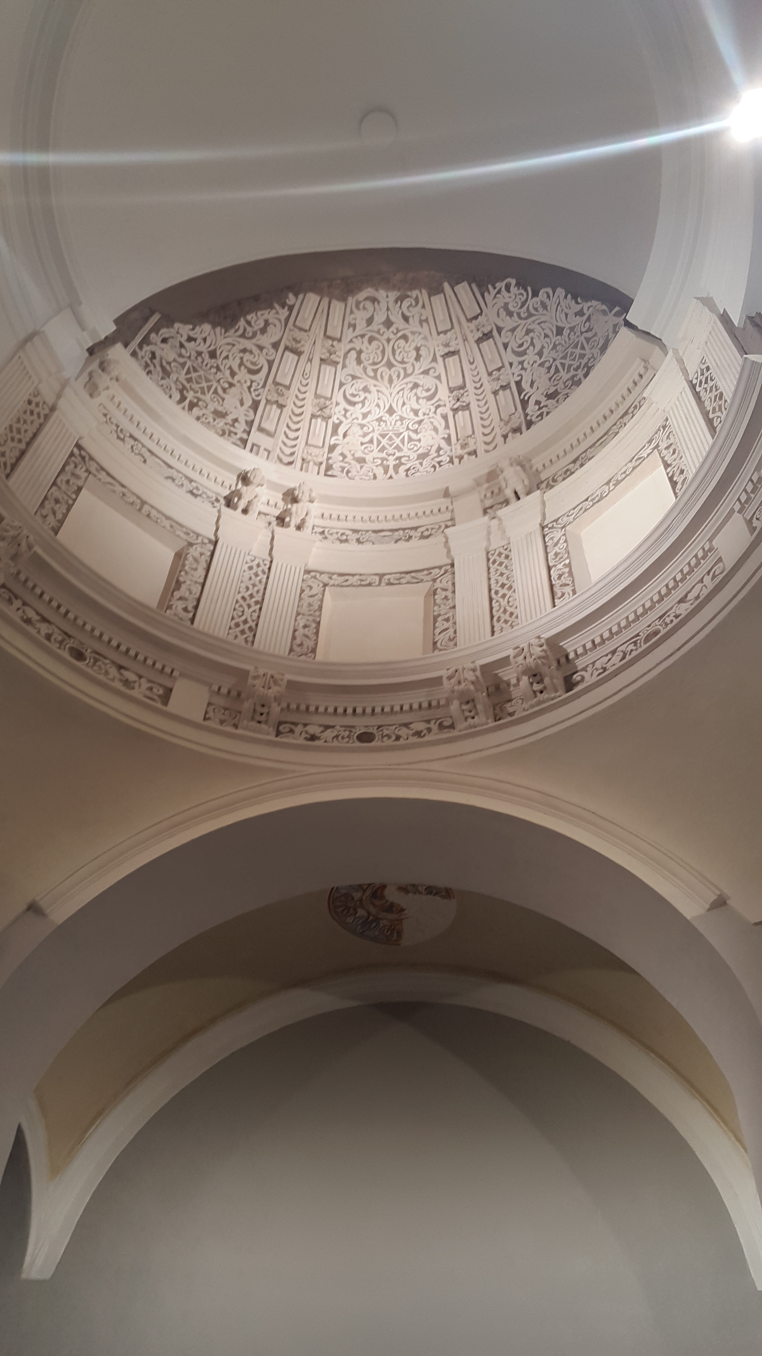 Cúpula de la Casa de la Esenyança restaurada